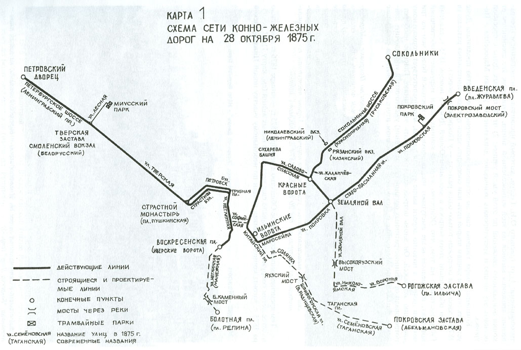 Схема сети конно-железных дорог